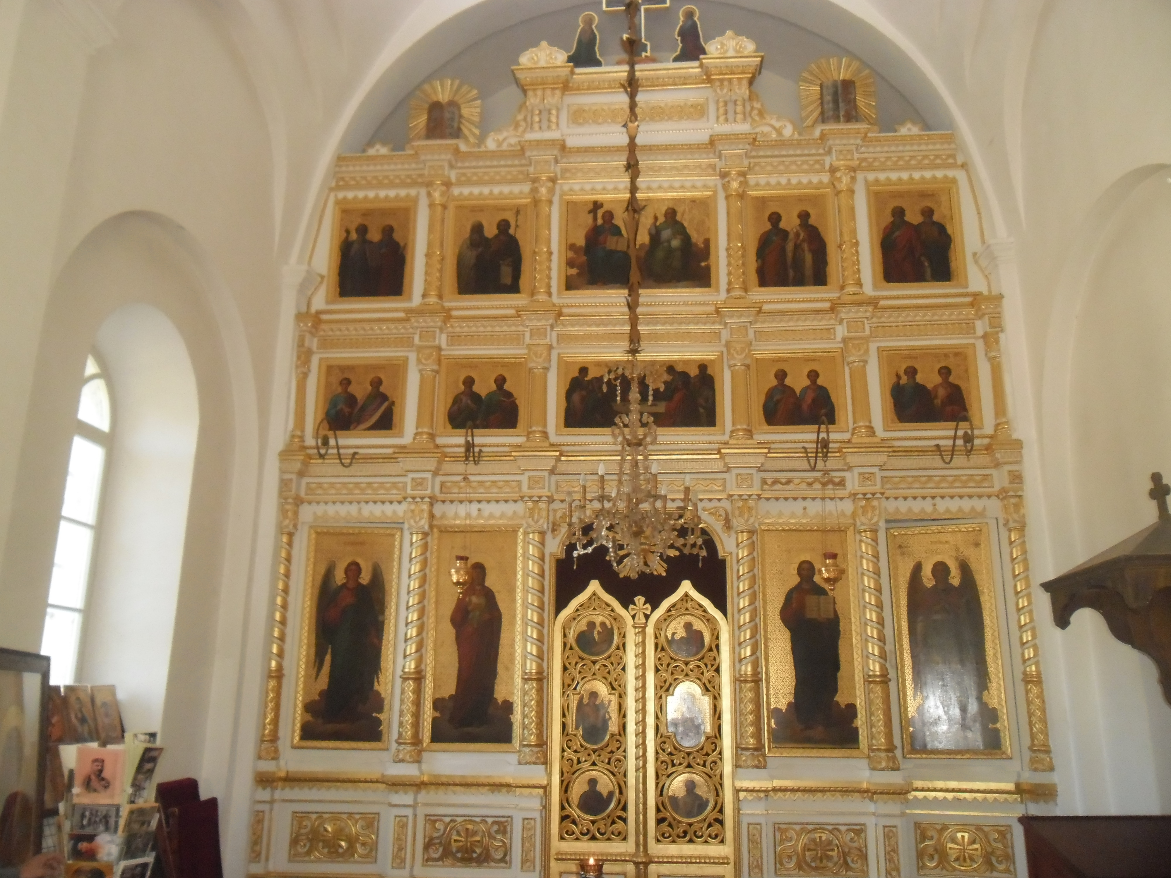 Cetinje